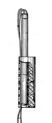 a dinamit